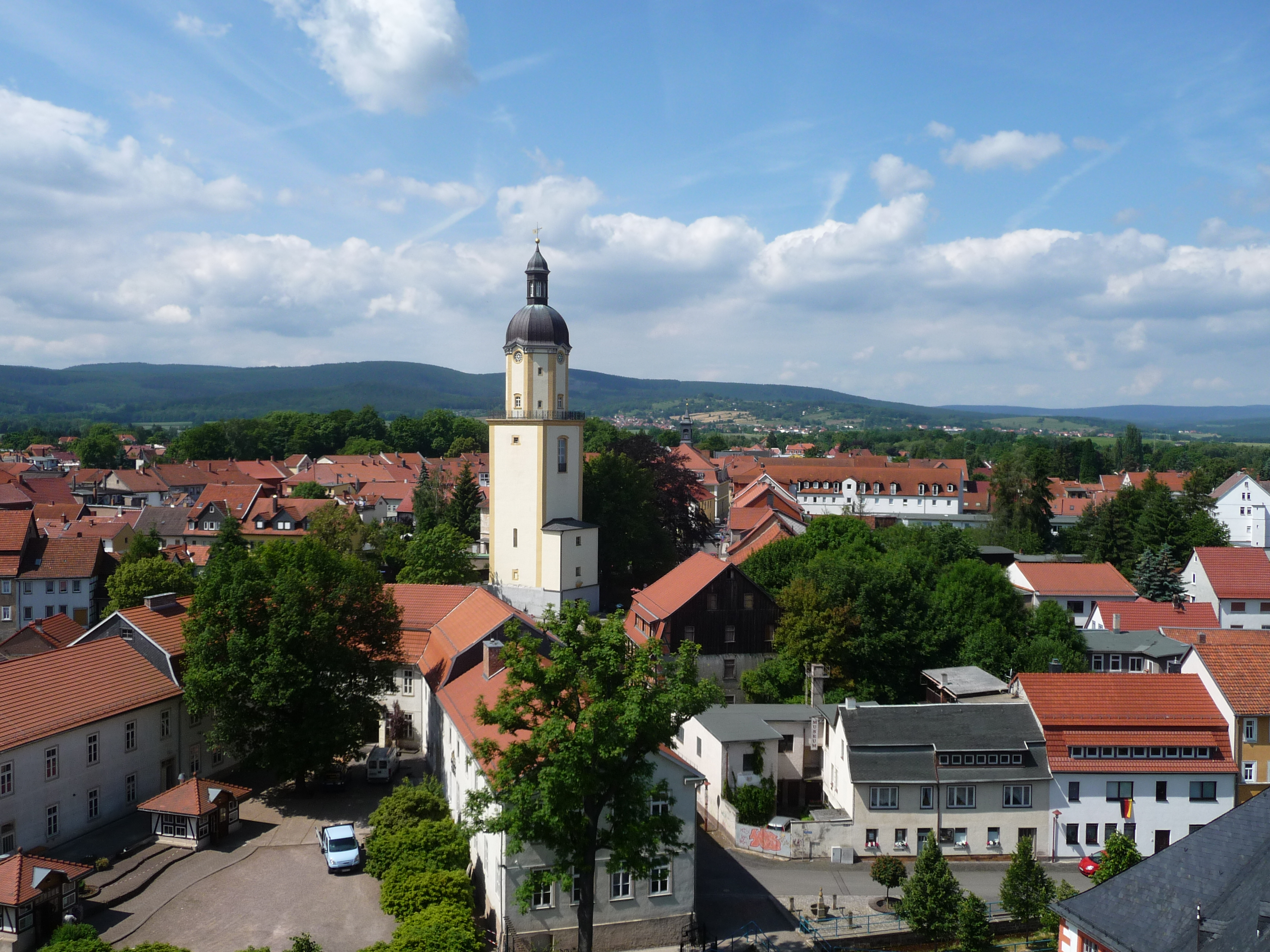 Blick vom Schlossturm auf den Kirchturm von St. Michaelis